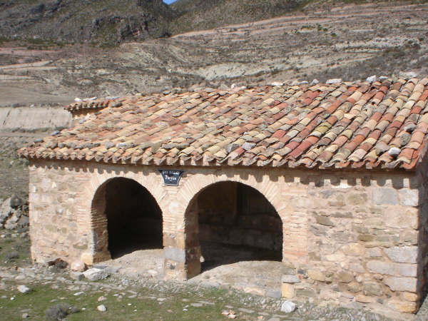 Ermita de San Millán, situada a un km de Muro de Aguas (La Rioja, España).